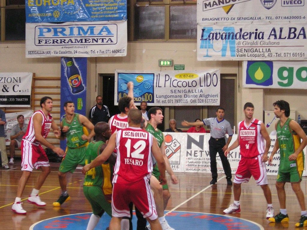 Scavolini - SICC: La finale del torneo finira' 85-79 per la SICC Jesi